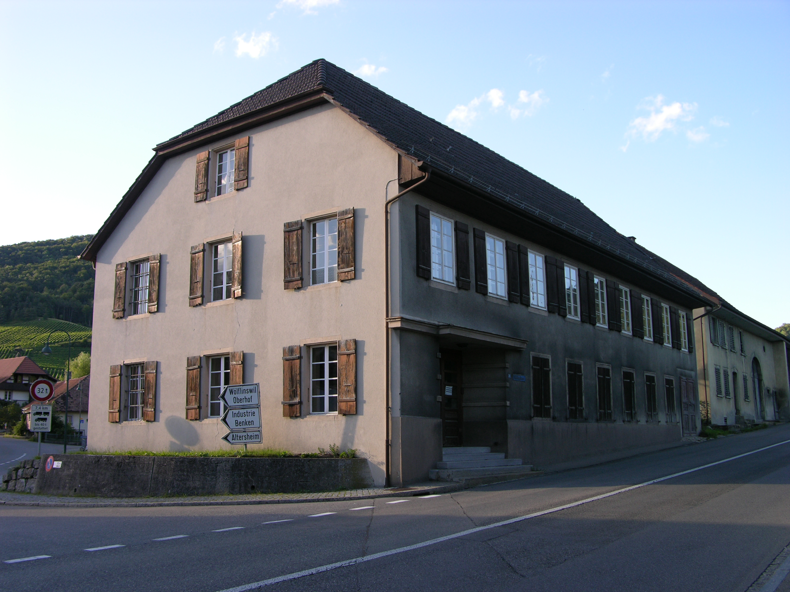 Küttigen: Altes Schulhaus in der Verzweigung Benken- und Staffeleggstrasse